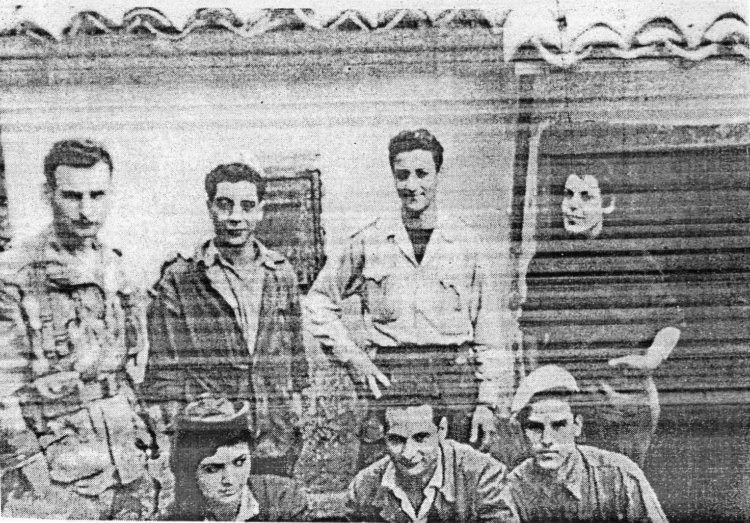 Debout à gauche Lamine Khene, ?, ?, Ziza Massika. Accroupis : Mériem Bouatoura, Abdelkader Boucherit, ?.